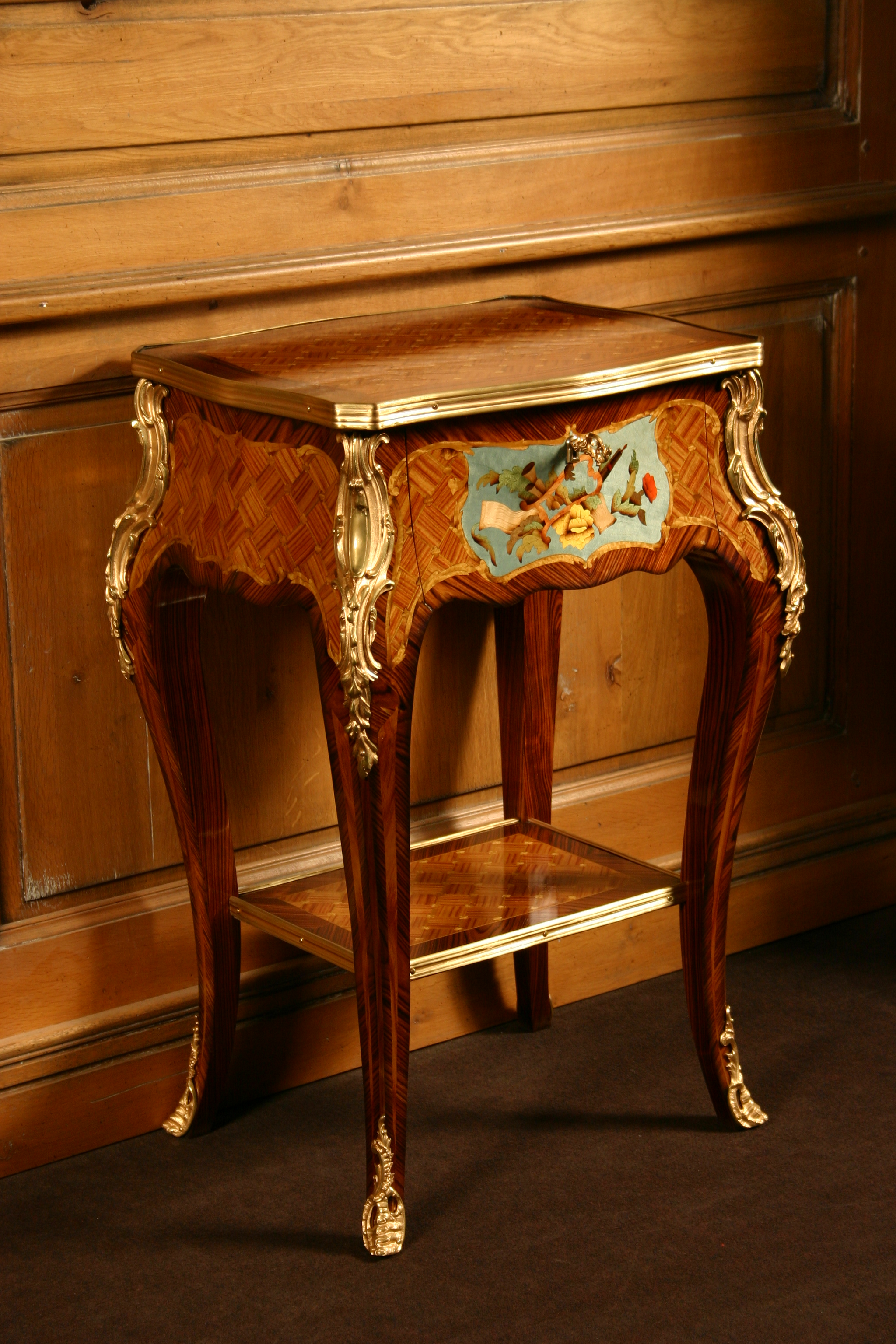 Table de chevet ou guéridon "Nicolas-Petit", reproduit d’après un modèle d'époque, réalisé par les Ateliers Allot Frères